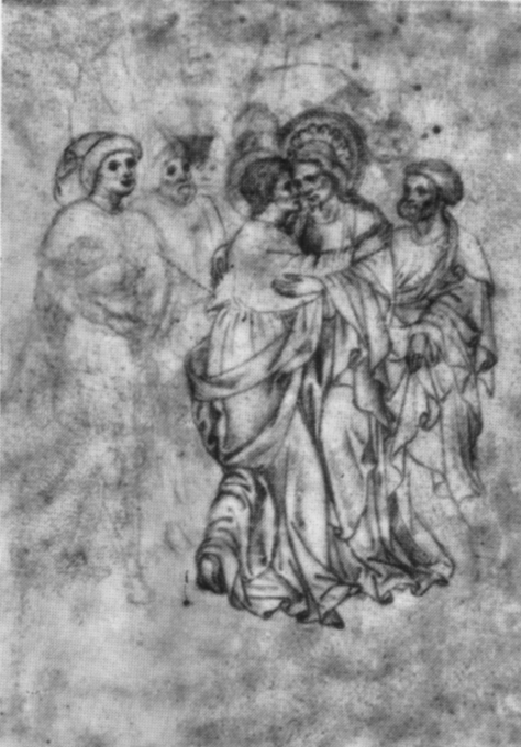 Pisanello, disegni, biblioteca ambrosiana 25r